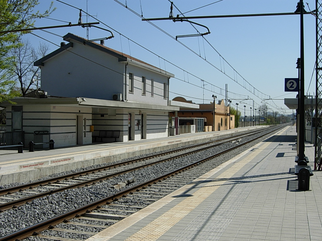 Stazione ferroviaria di Misano Adriatico nel 2007